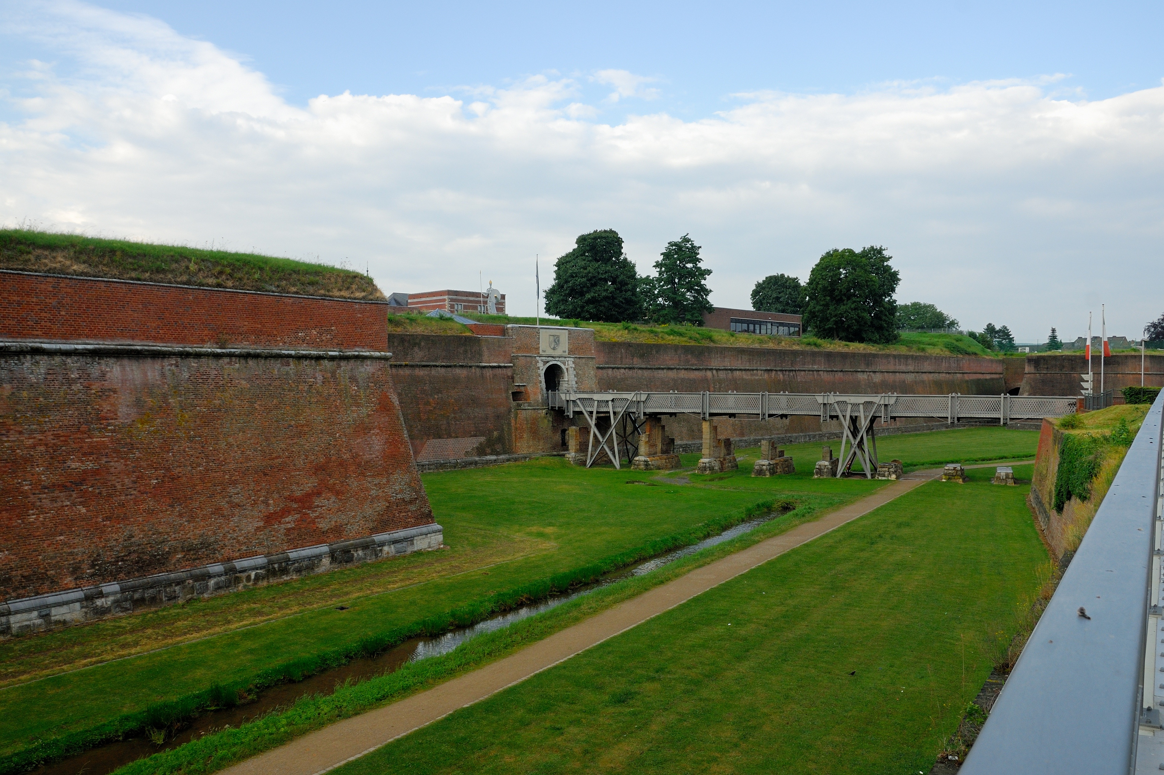 Zitadelle Jülich, DüsseldorferstraßeThis is a photograph of an architectural monument., no. 4